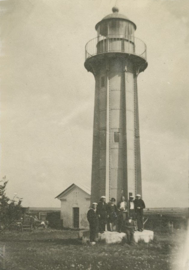 Viirelaiu tuletorn (Paternosteri tuletorn)